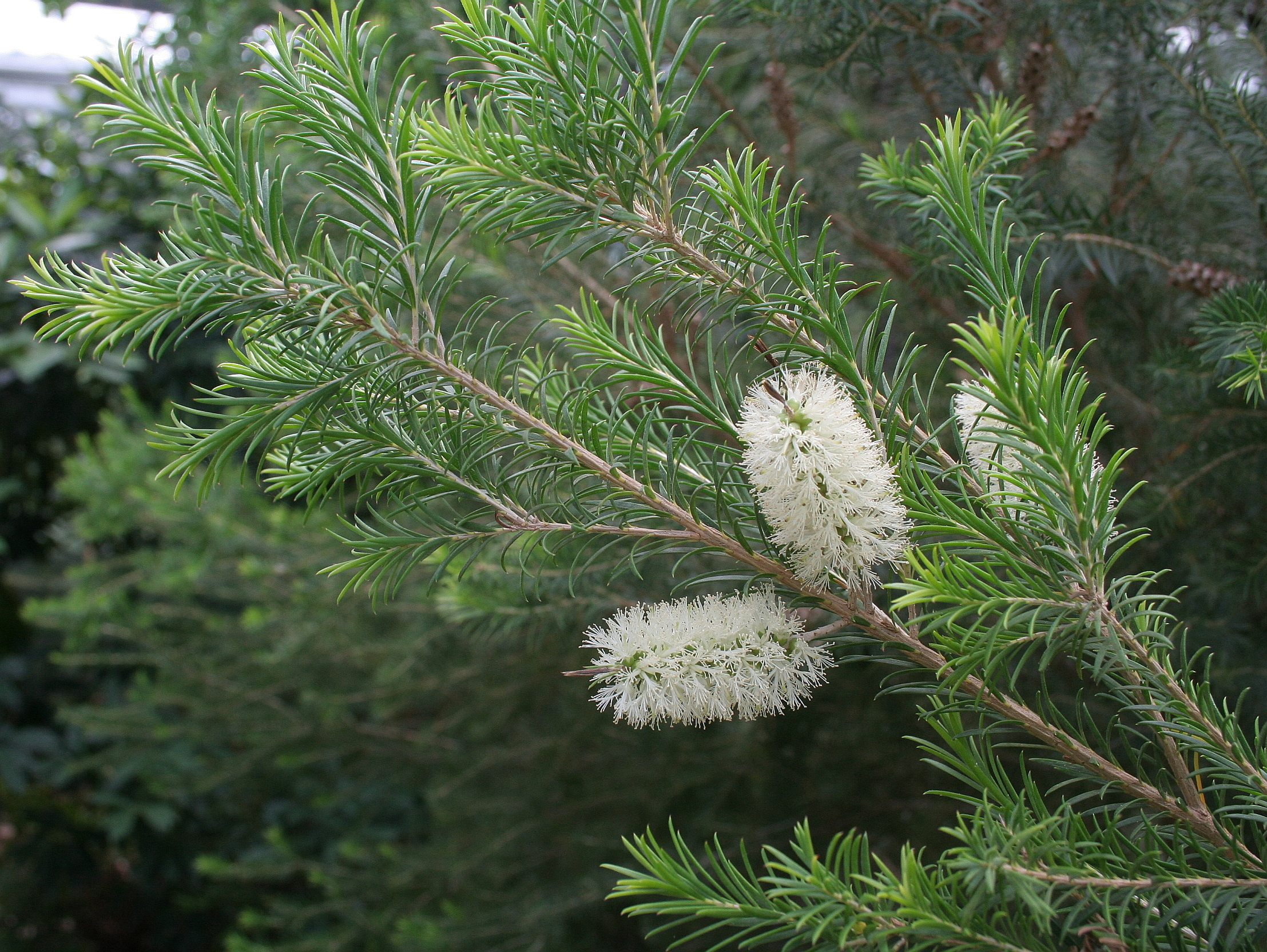 Melaleuca graminea, Conservatoire botanique national de Brest, France, juin 2007